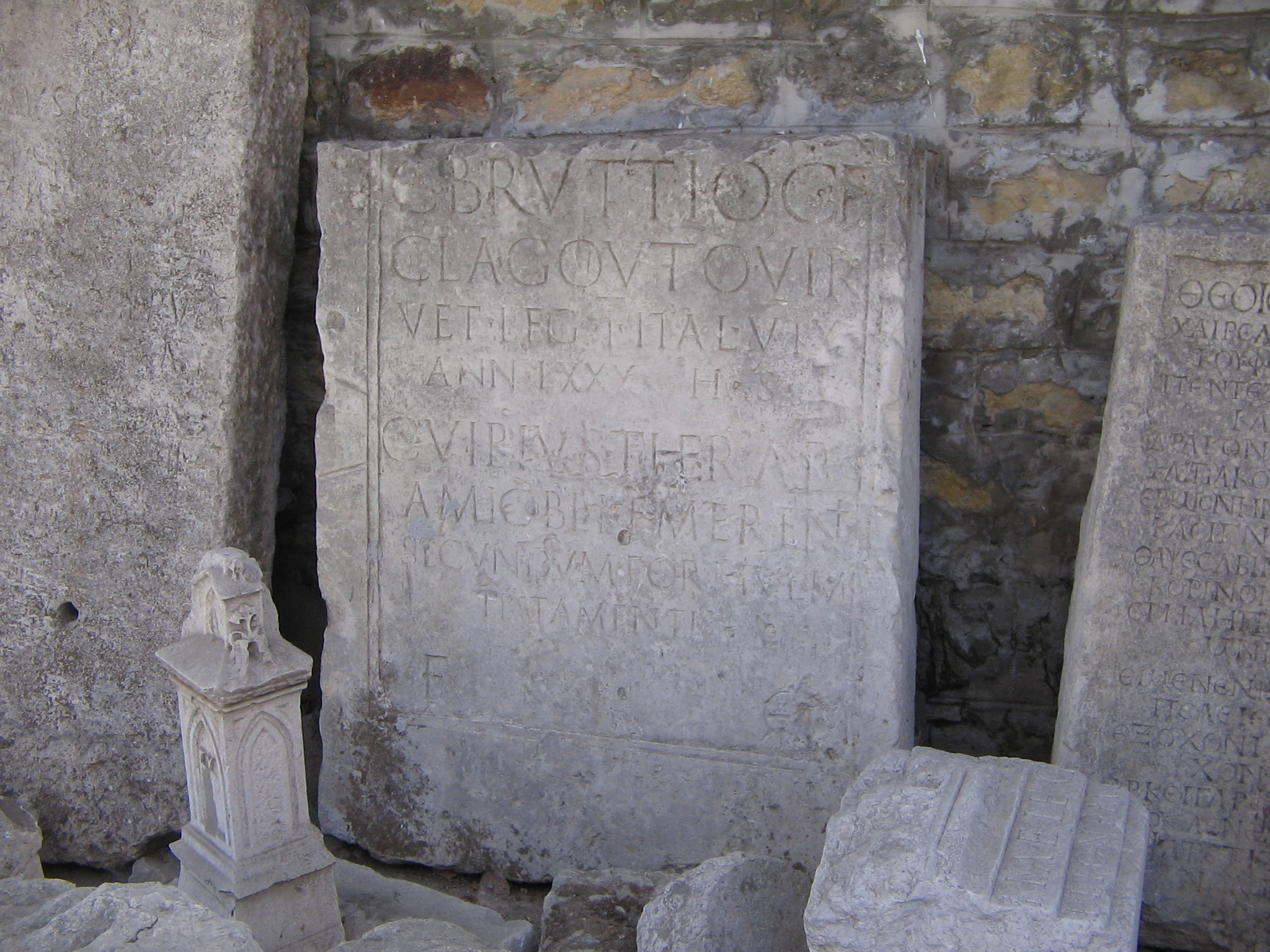 надгробен надпис със съдържание ------?] / C(aio) Bruttio C(ai) f(ilio) / Cl(audia) Gouto Vir(uno) / vet(erano) leg(ionis) I Ital(icae) vix(it) / ann(os) LXXX h(ic) s(itus) e(st) / C(aius) Vibius Therapo / amico bene merenti / secundum formulam / testamenti / f(aciendum) c(uravit)